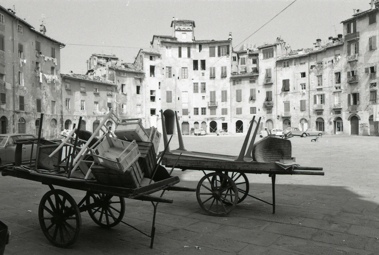 Servizio fotografico : Lucca, 1977 / Paolo Monti. - Strisce: 6, Fotogrammi complessivi: 33 : Negativo b/n, gelatina bromuro d'argento/ pellicola ; 35 mm. - ((Sul portanegativi: N[I]K[MA]T FP4. - All'interno del portanegativi: la serie è anche identificata da una linea orizzontale a pennarello blu che separa la suddetta serie dalla precedente di soggetto diverso. - Fonte: Agenda di Paolo Monti: Leica 1501-3000 Controllo numerazione (1950-1978), presso Archivio Paolo Monti